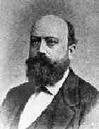 Ritratto di Giuseppe Basso (1842-1895), fisico italiano